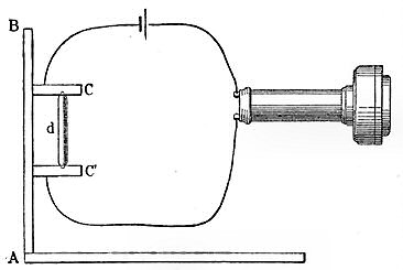 Motiv: Hughes’ Mikrophon Bearbeitung: Agon S. Buchholz (asb)